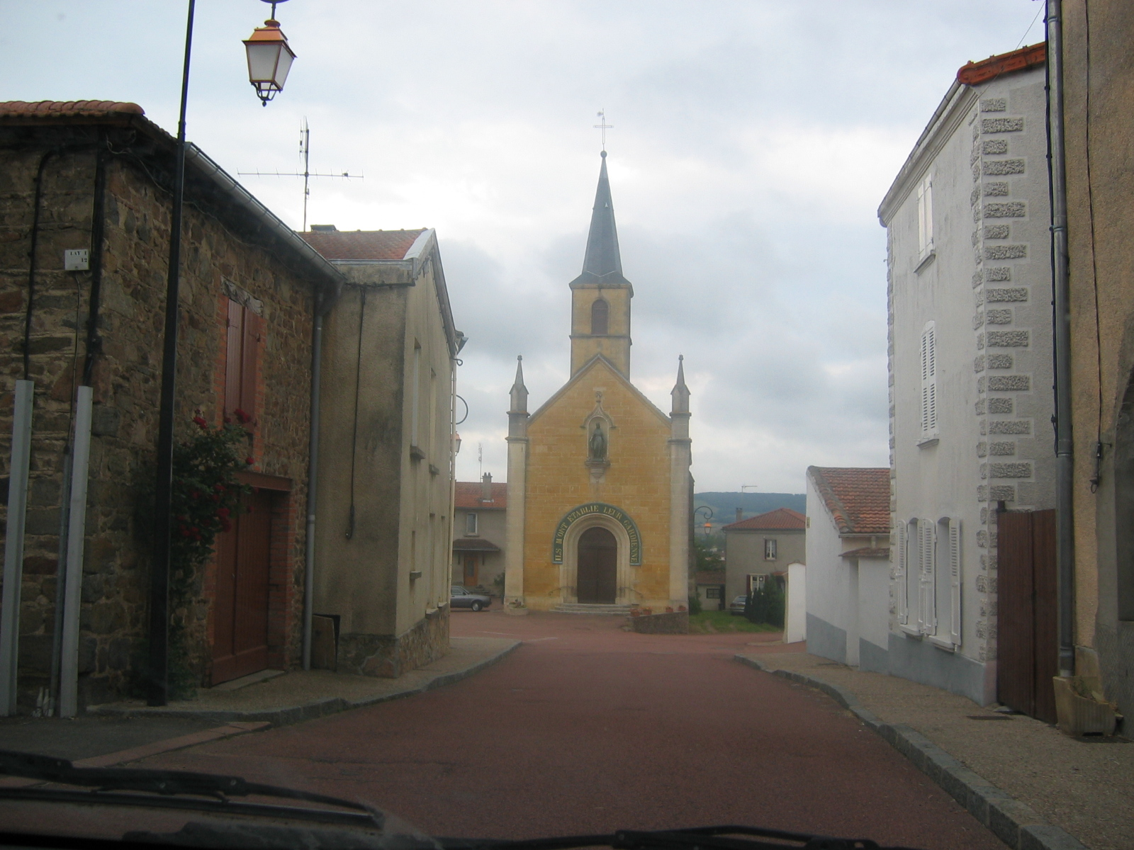 Chapelle Notre Dame